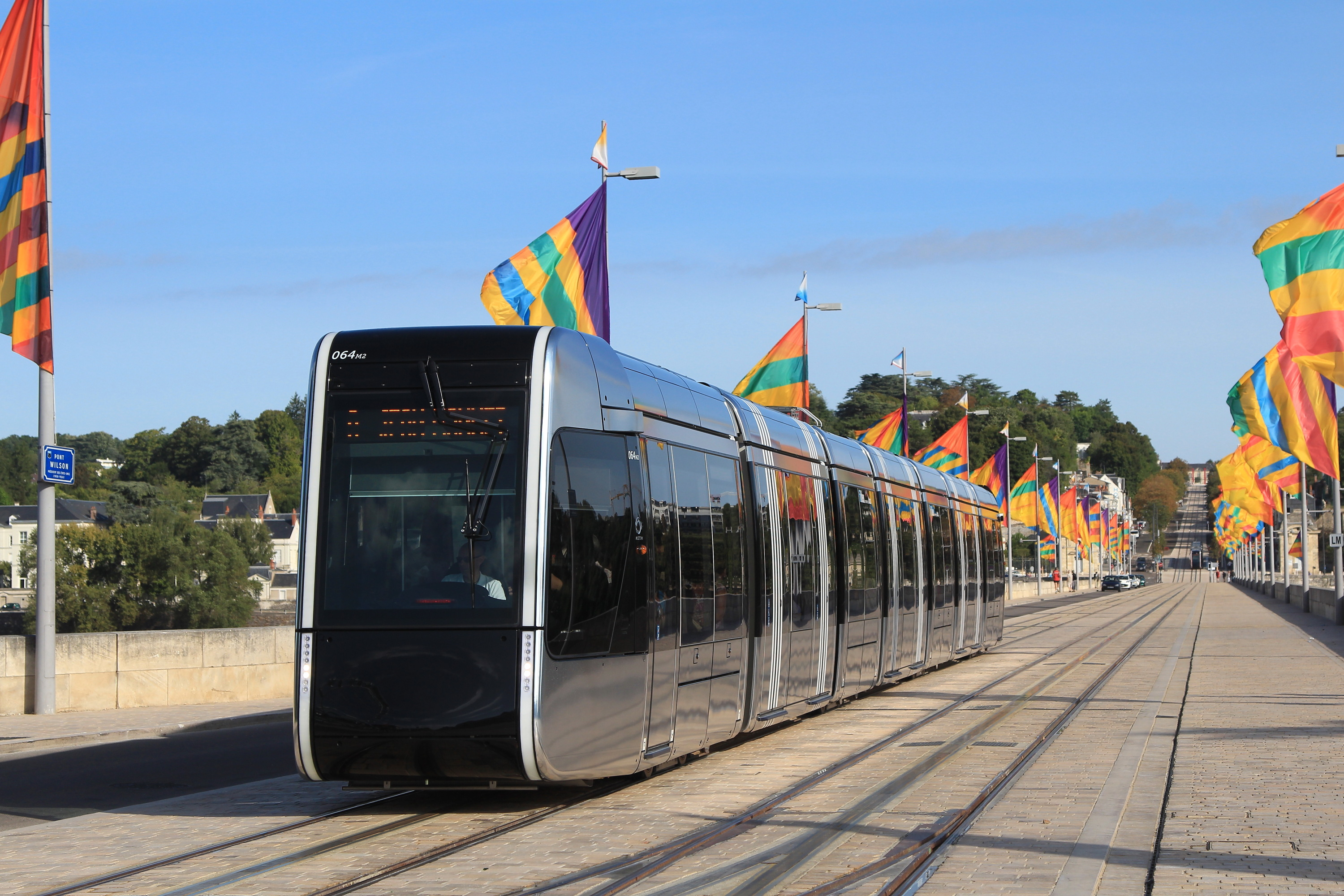 Un tramway sur le Pont Wilson, à Tours.